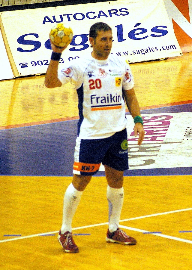 Carlos Viver Arza